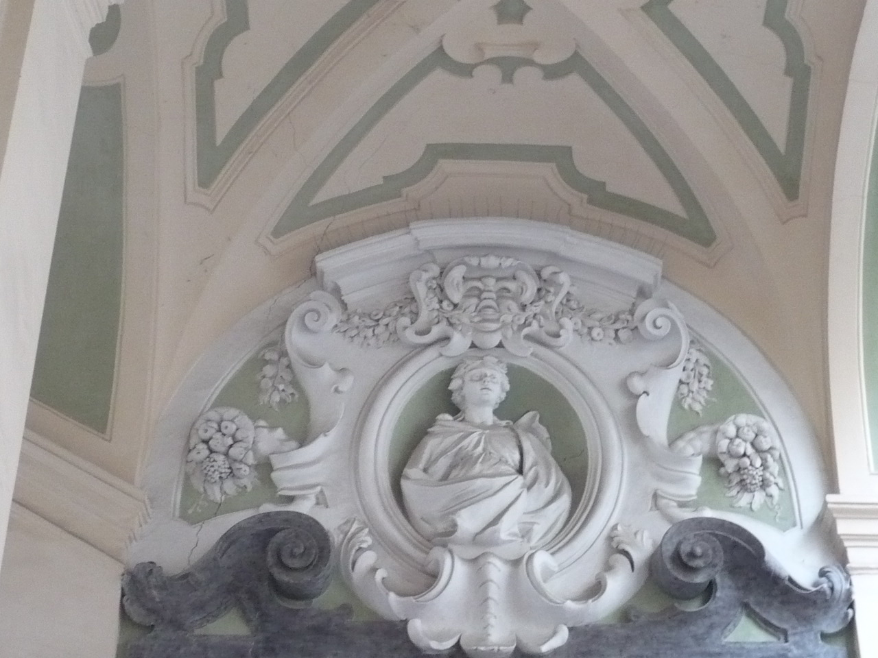 Palazzo dello Spagnolo - Napoli. Completano la doppia scalinata delle decorazioni poste al di sopra delle porte di ingresso, dove sono rappresentati i membri della famiglia che lo possedeva prima che diventasse proprietà di Tommaso Atienza detto "lo spagnolo".